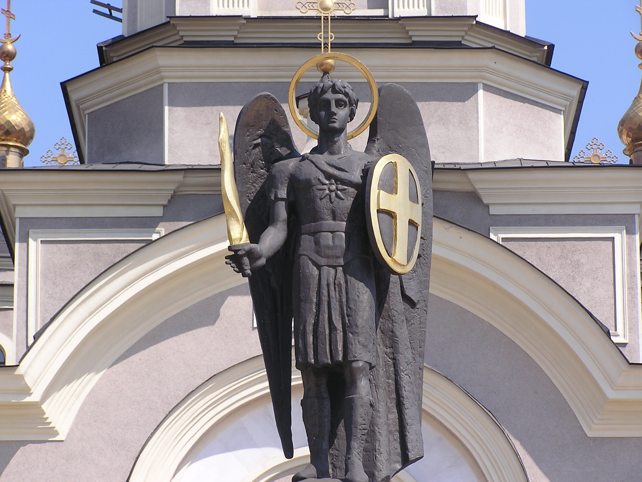 Свято-Преображенский кафедральный собор в Донецке, бронзовая статуя архангела Михаила, которую подарила администрация Киева Свято-Преображенский кафедральный собор